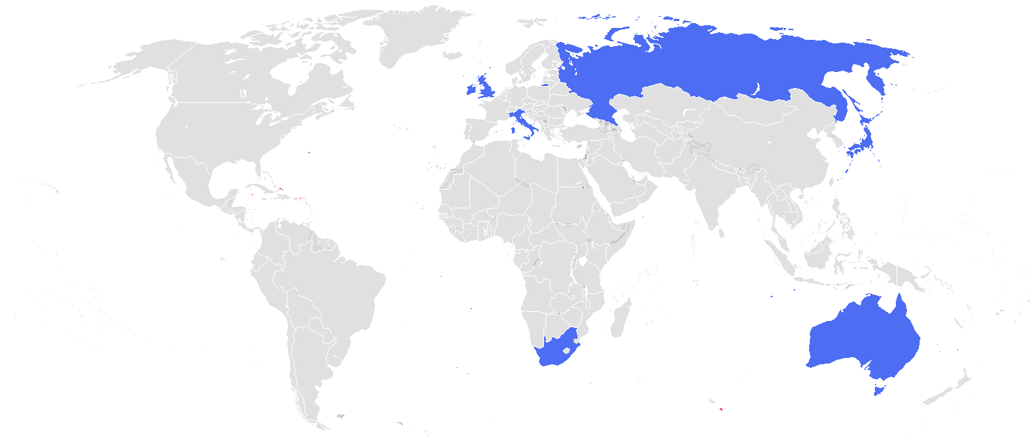 Paises que presentaron candidatura para acoger la Copa del Mundo de Rugby 2019